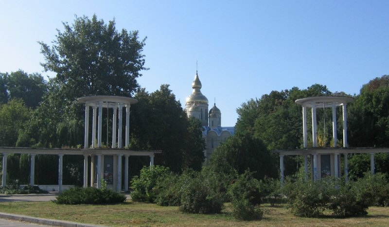 Вхід до Соборного парку в Черкасах